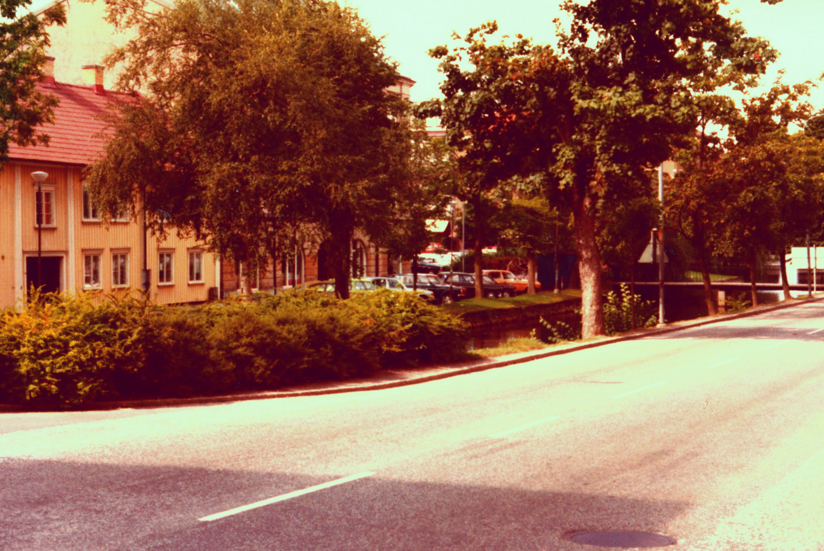 Alingsås, framför Lilla torget (ca 1972).